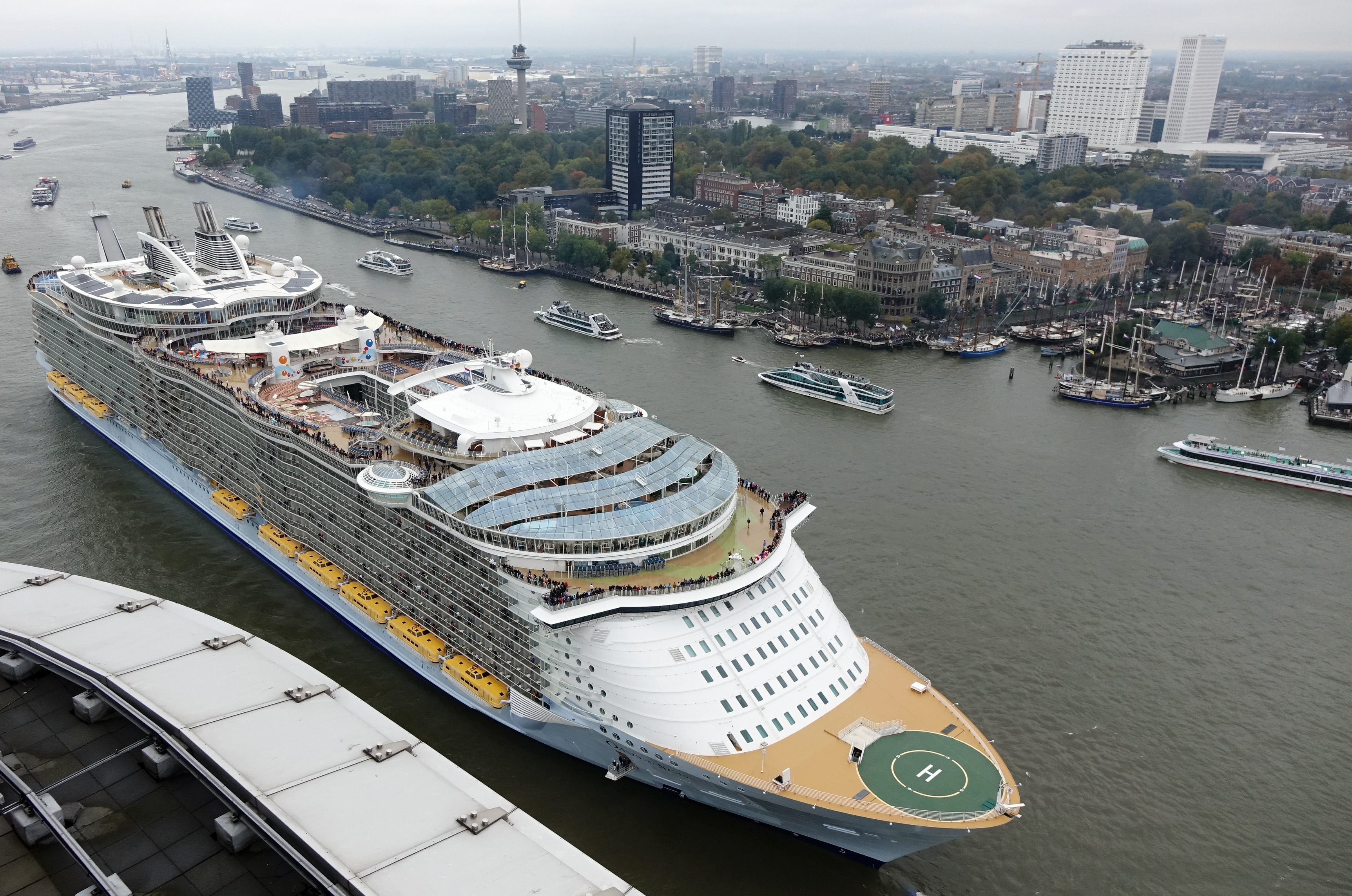 Vertrek uit Rotterdam van de Oasis of the Seas , gezien vanaf de éénendertigste etage van het World Port Center.